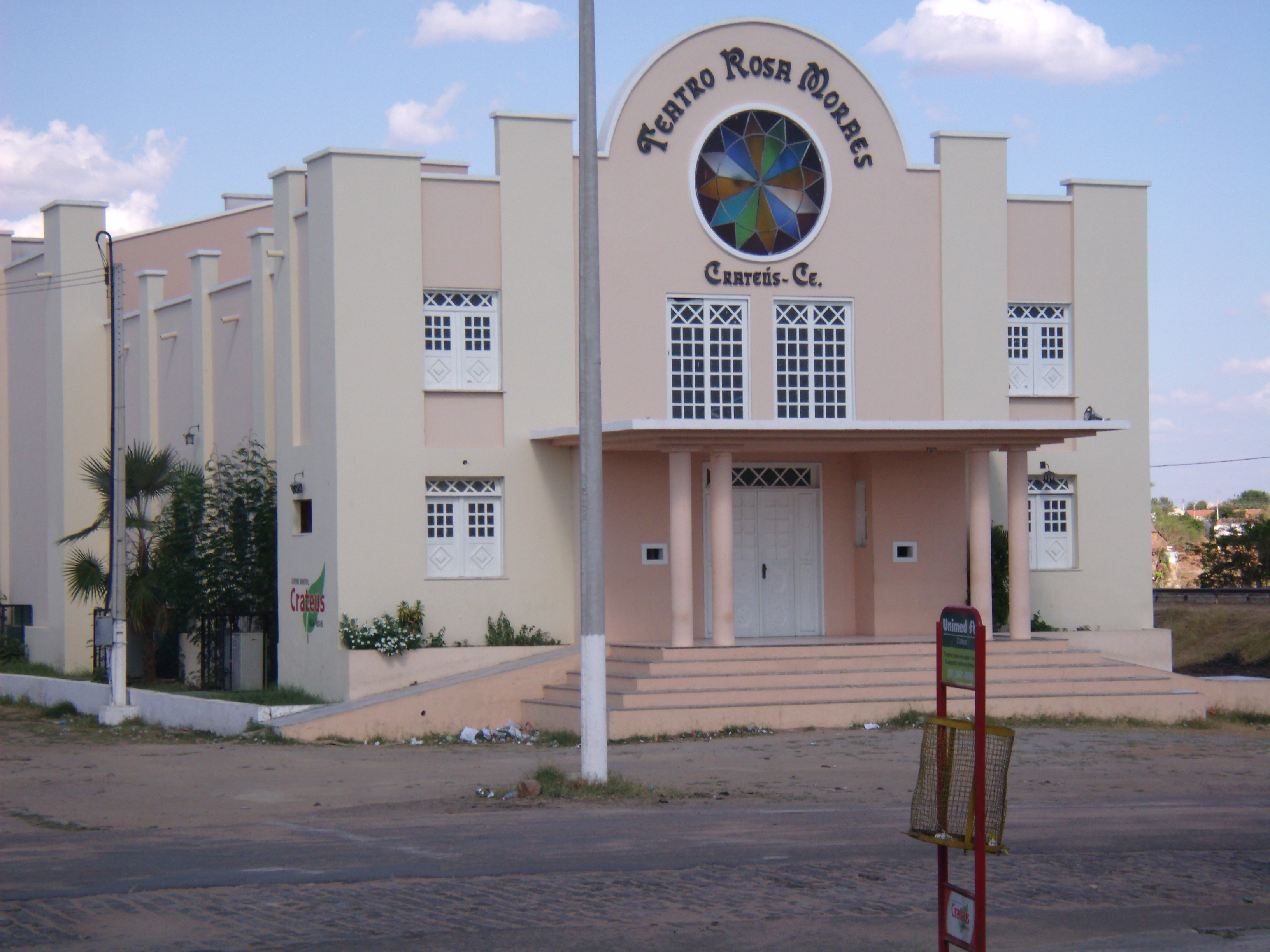 Teatro Rosa Moraes - Crateús - Ceará